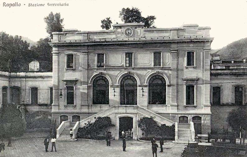 La stazione ferroviaria di Rapallo nel 1921, Rapallo, Liguria, Italia